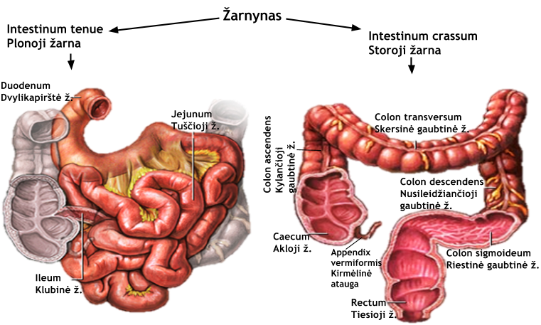 žarnyno dalys